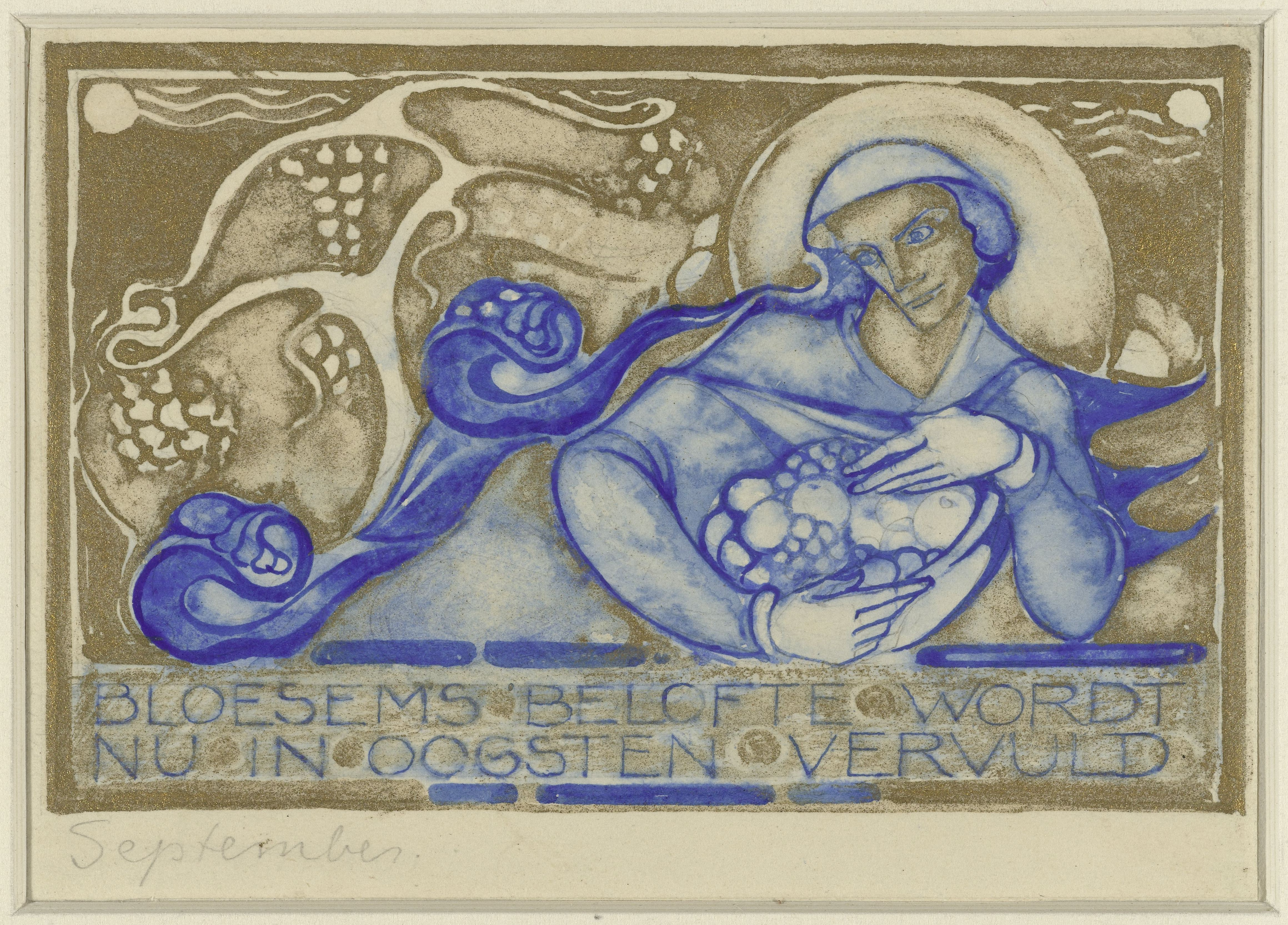 Bloesems belofte wordt nu in oogsten vervuld, september Man ten halven lijve met een mand met vruchten in zijn armen, tegen een goudkleurige achtergrond.